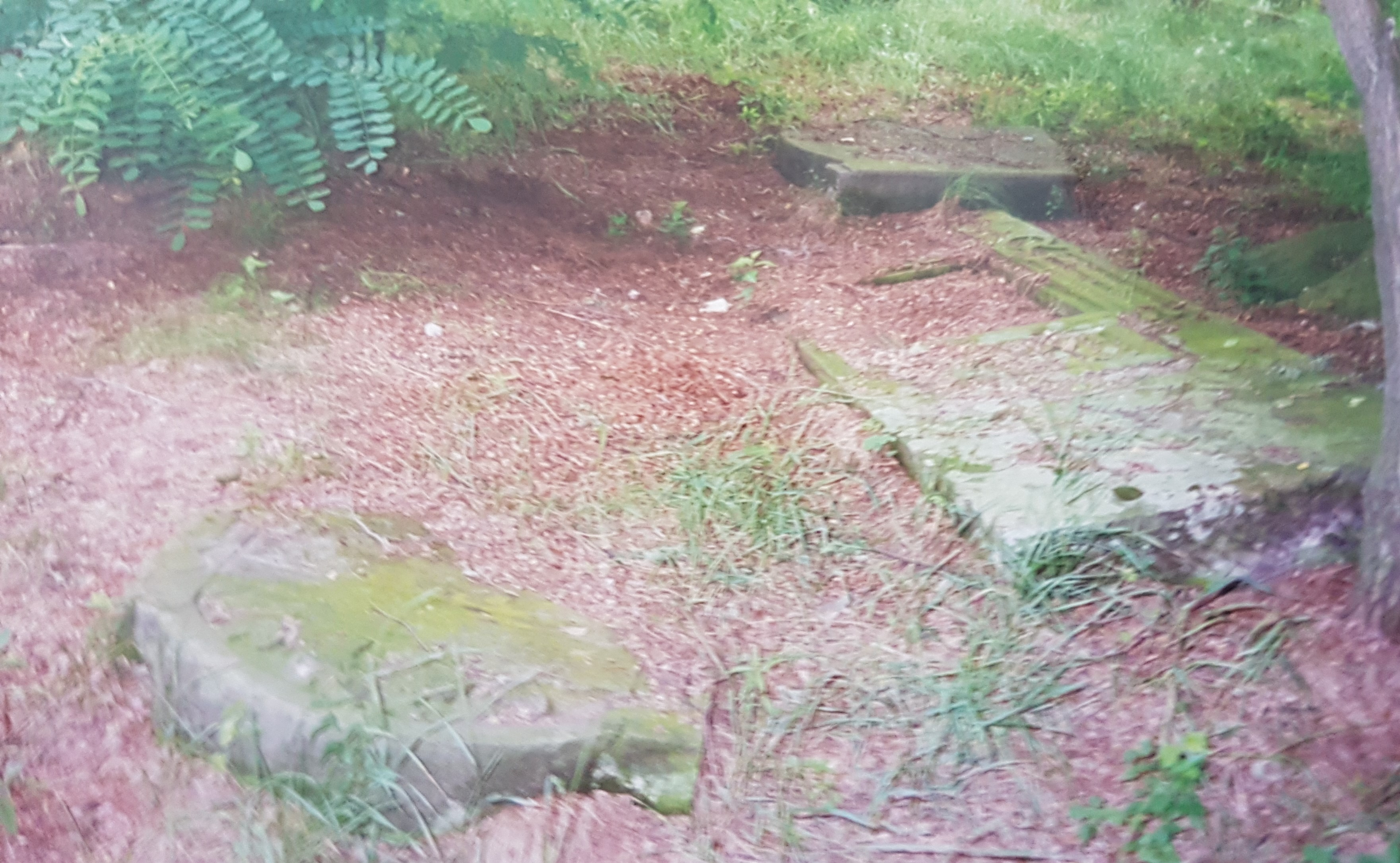 בית הקברות היהודי בלאסק